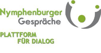 nyg